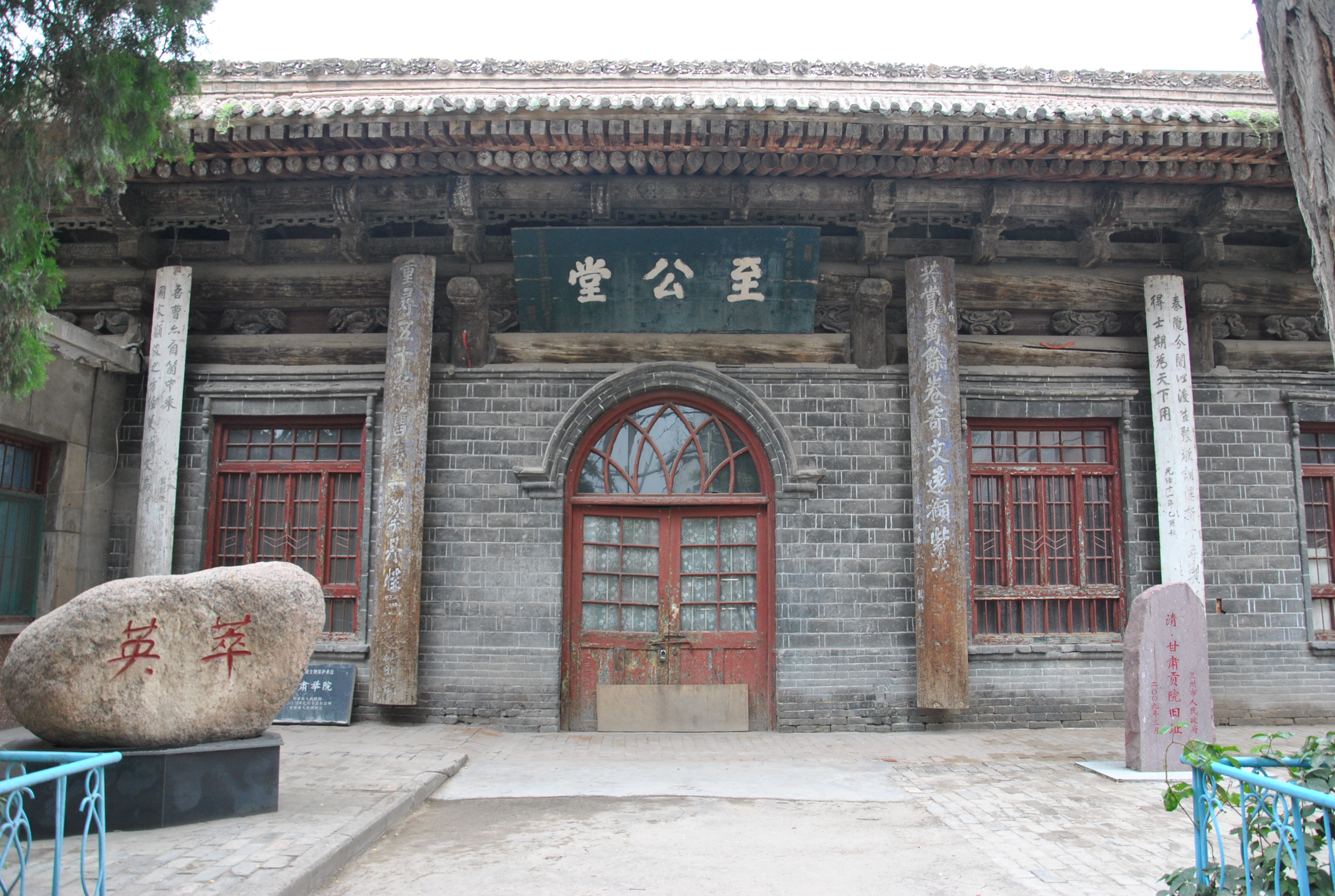 中文（中国大陆）: “至公堂”匾额及两旁的两幅对联均为左宗棠手撰